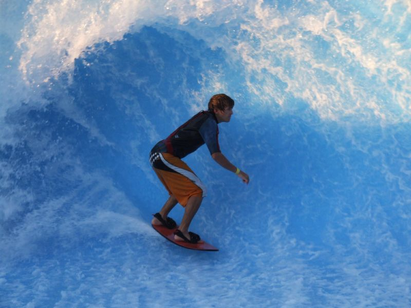 surfer surfing